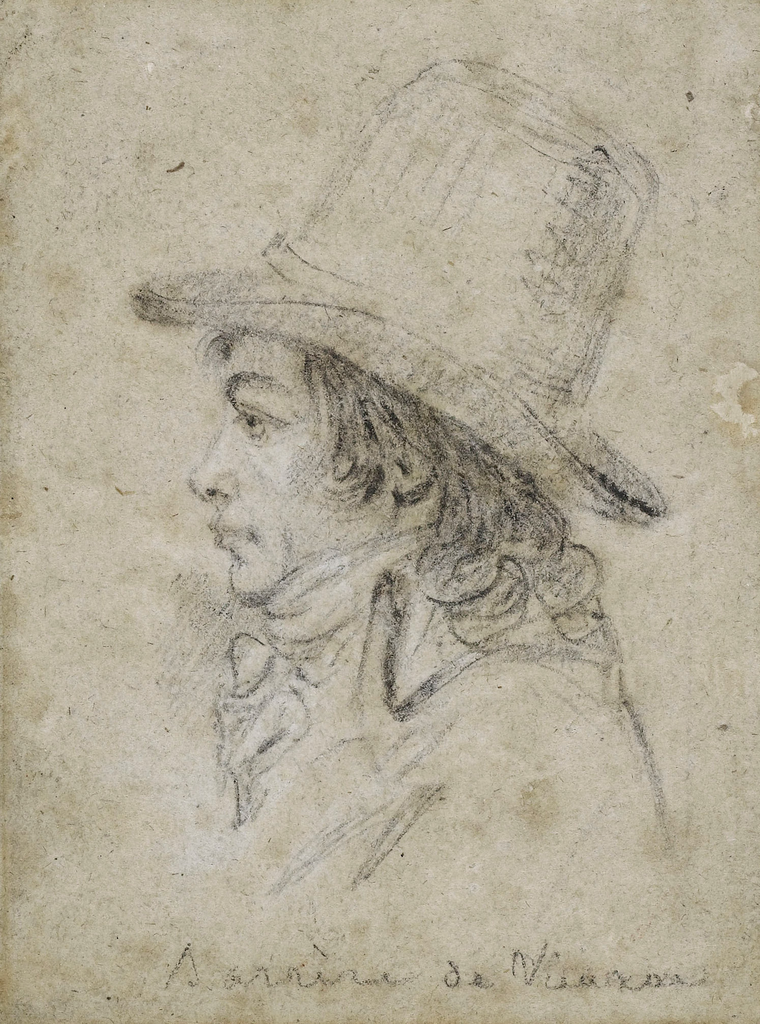 Croquis de Bertrand Barère de Vieuzac.